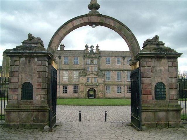 Lyme Hall, Entrance Gates